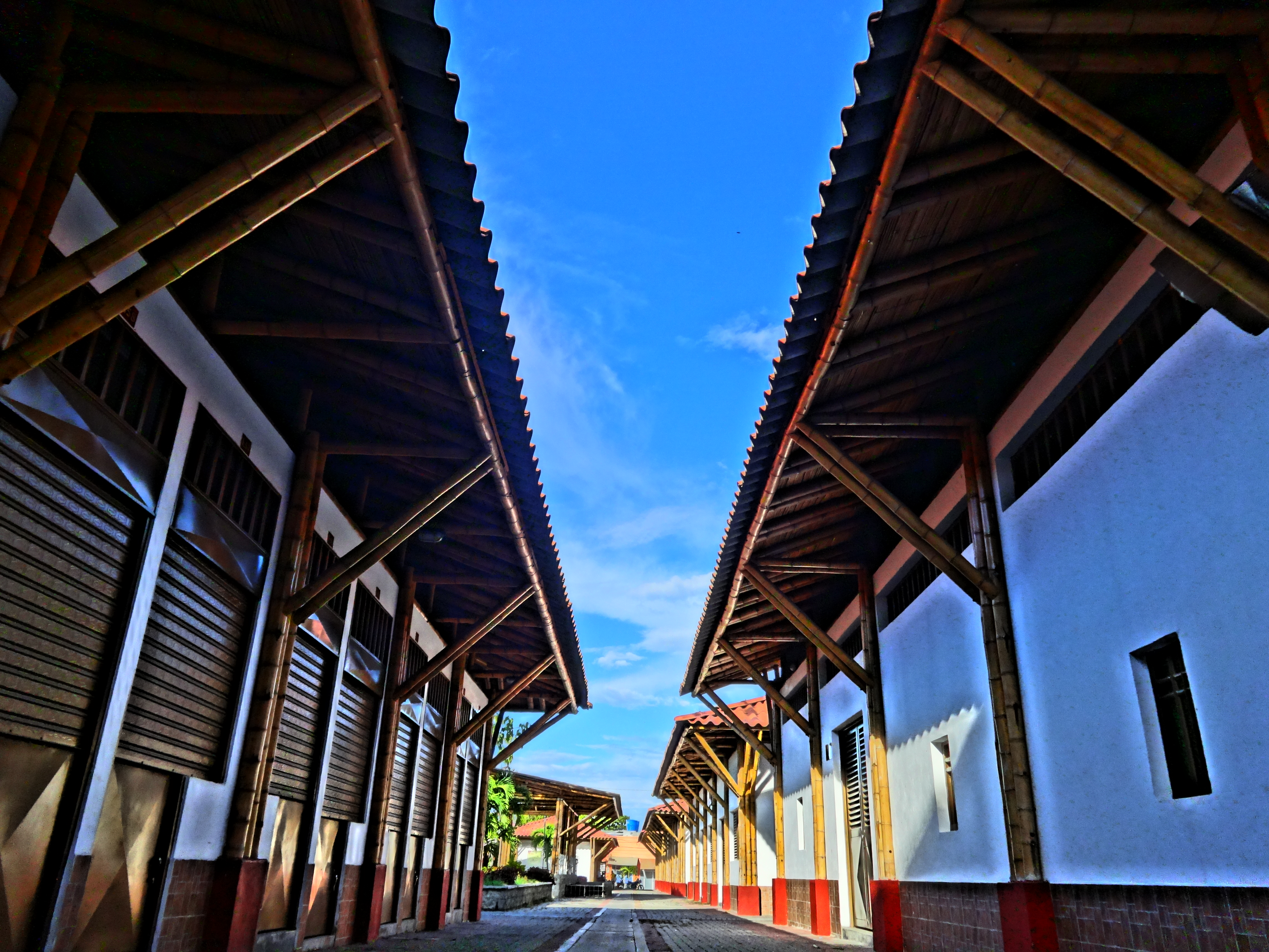 Espinal, Tolima, Colombia